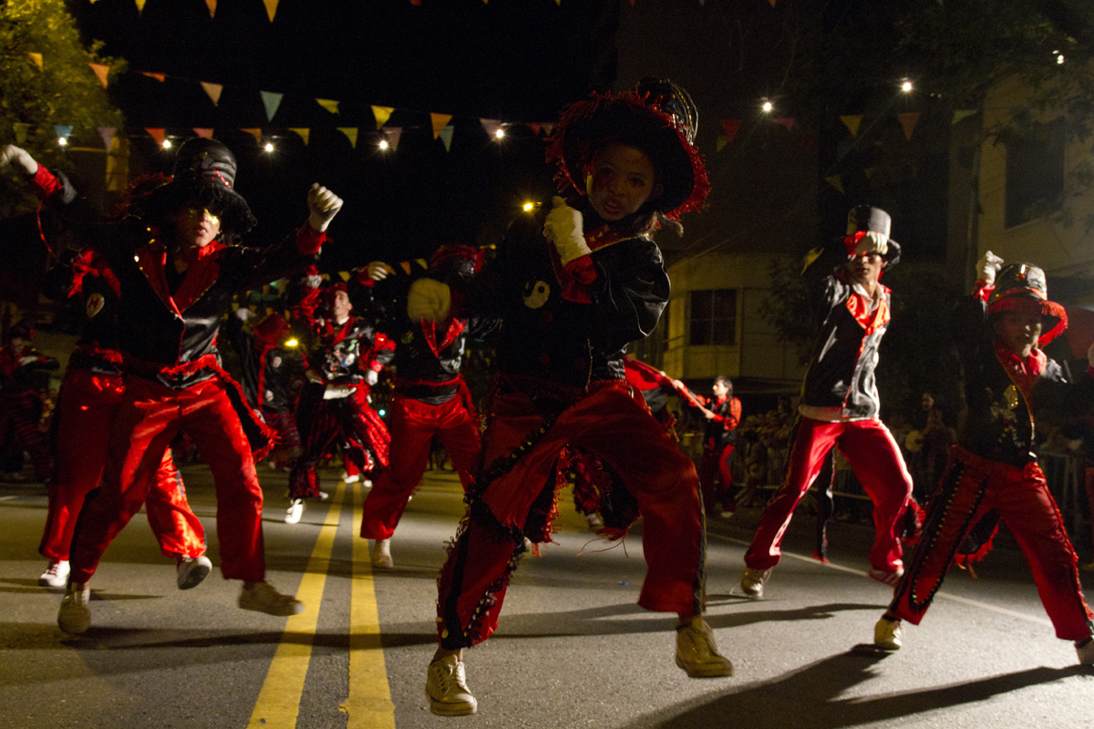 Cada fin de semana contaremos con toda la música, alegría y color de más de cien murgas que se presentan desfilando por los barrios porteños. ( Foto: Estrella Herrera)